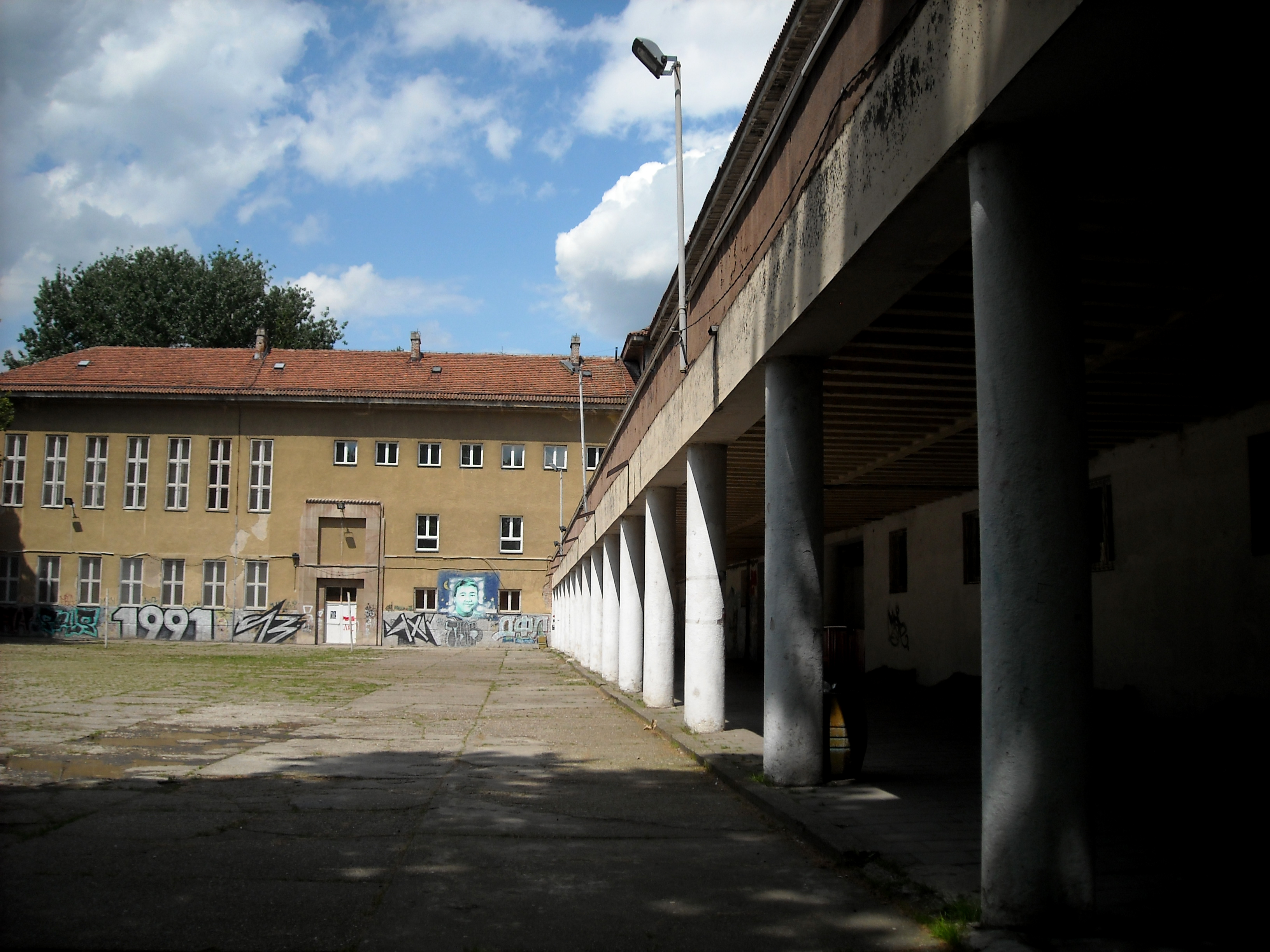 Osma beogradska gimnazija